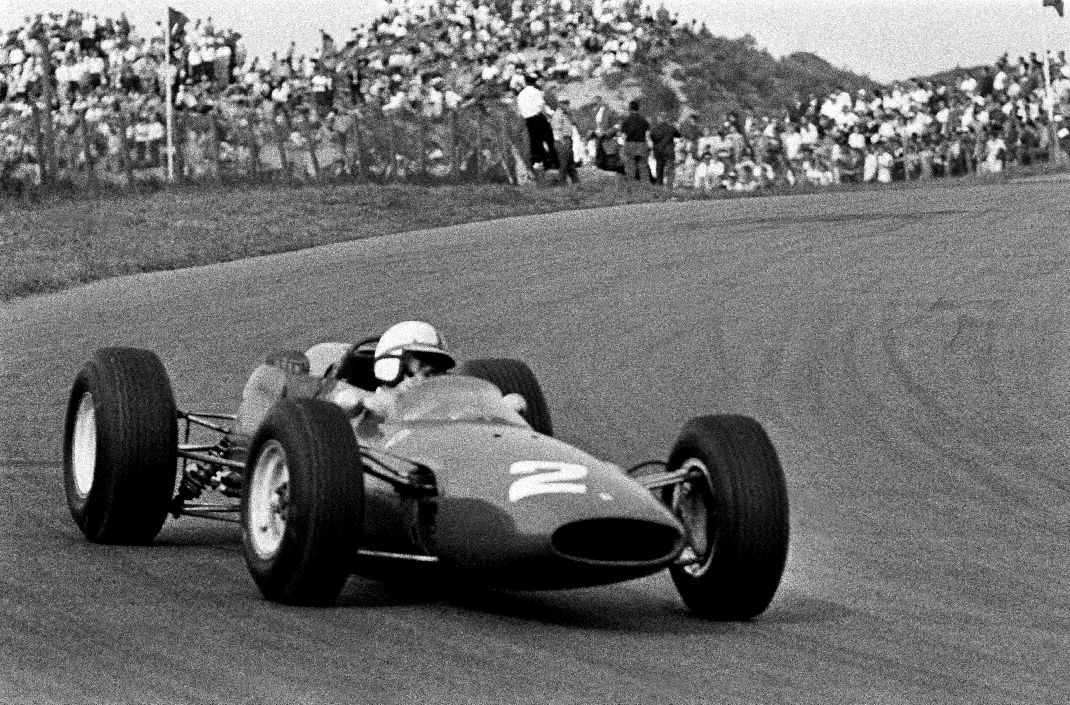 Grand Prix van Nederland, het rennersveld Jim Clark.